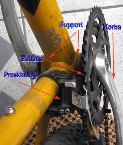 Support rowerowy widok z góry - robota własna